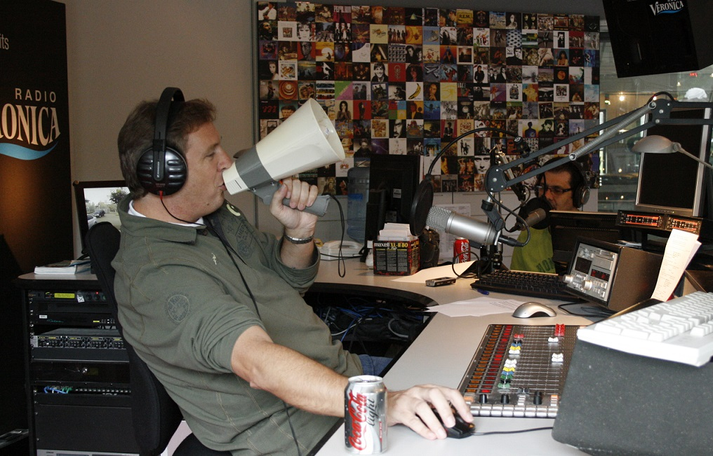 Rob van Someren in de studio van Radio Veronica tijdens een uitzending van het programma Somertijd.